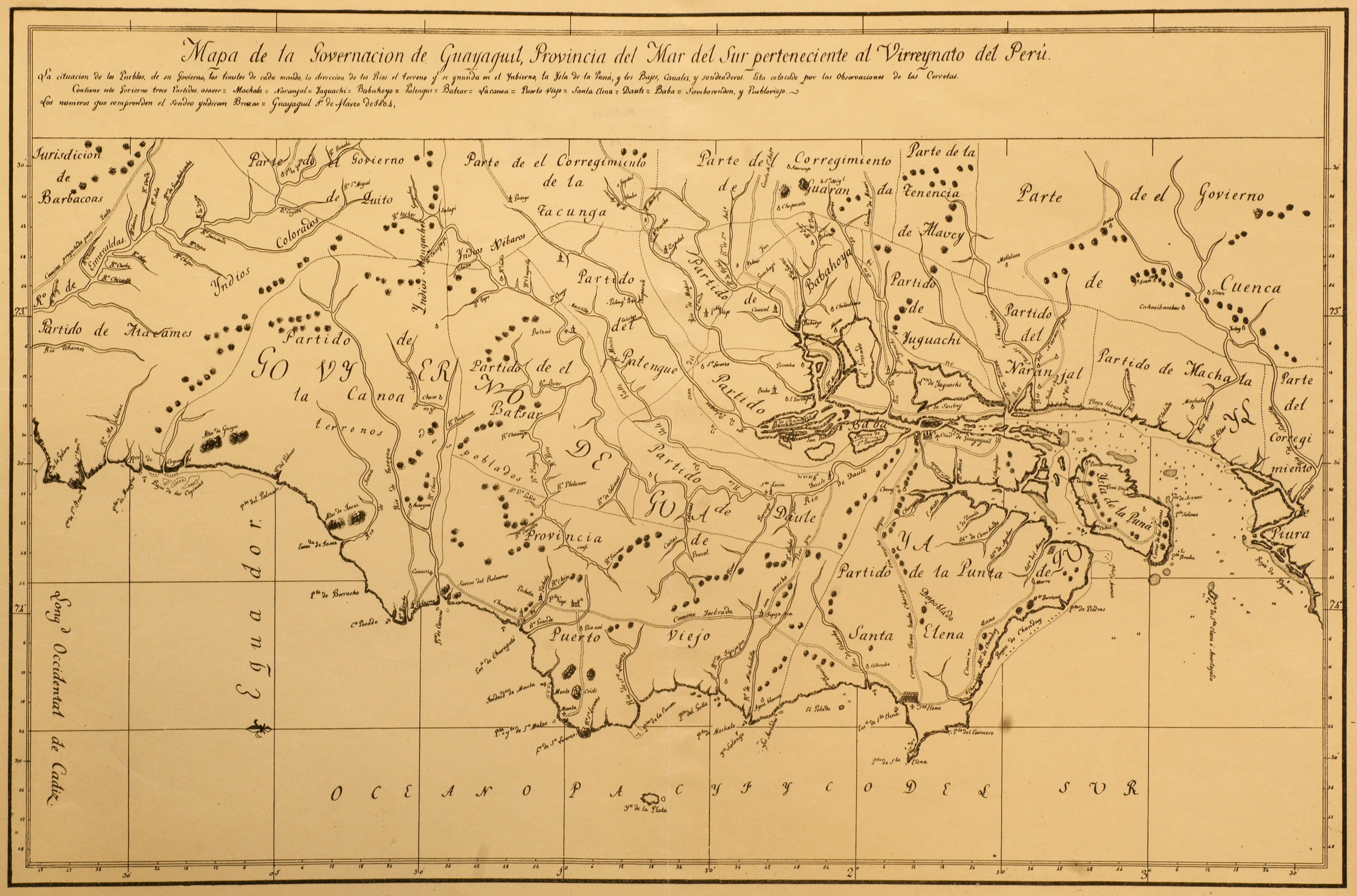 Diapositiva de Consulta publica custodiada en los Fondos Digitales del Archivo Histórico del Guayas (AHG); Guayaquil, Ecuador.Consultado y compartido por el usuario J. Javier García A.